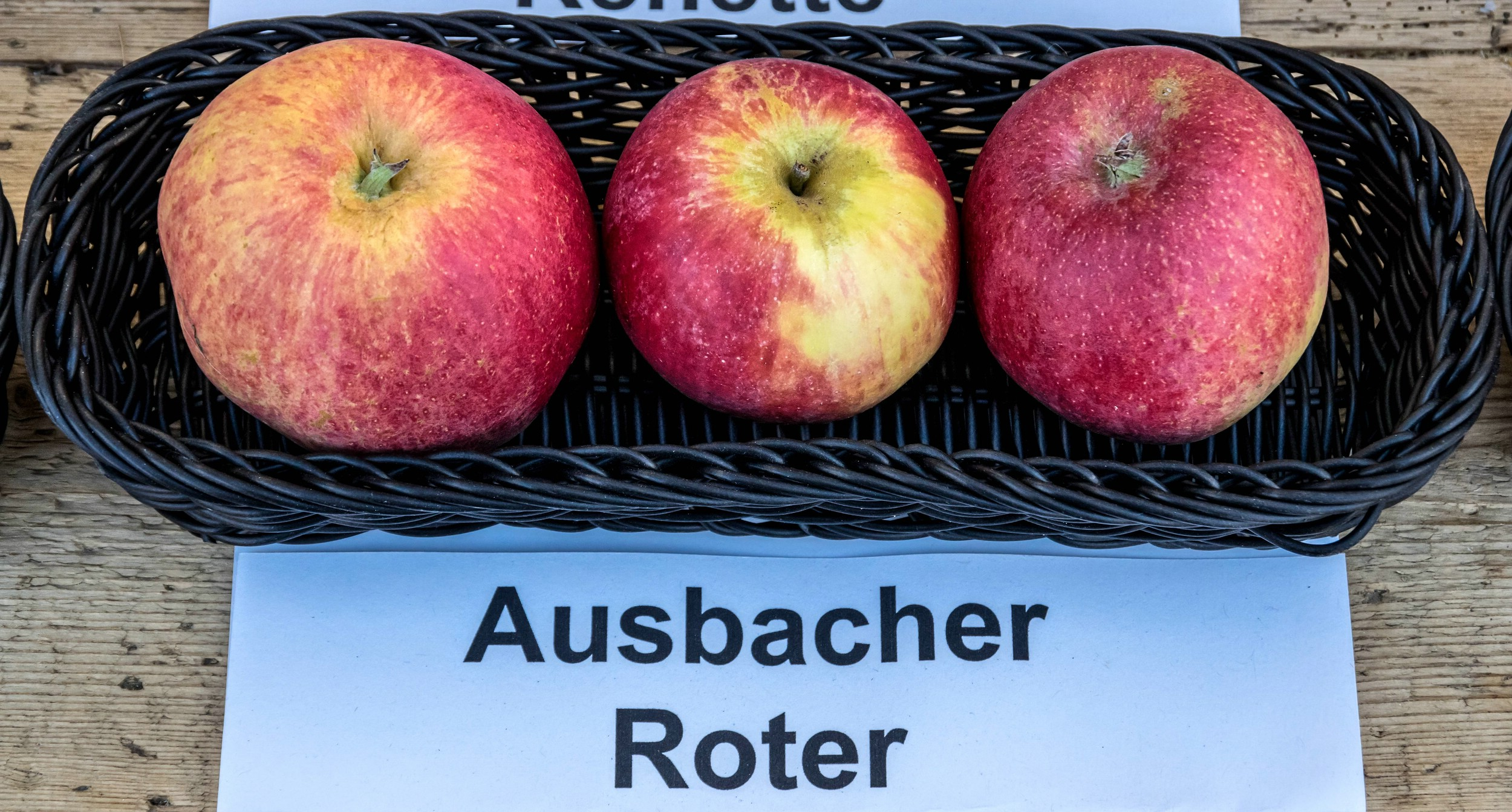 Alte Apfelsorten, von denen es im Badischen noch tragende Bäume gibt. Alle Aufnahmen au dem Oktober 2015